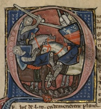 Siege of Antioch